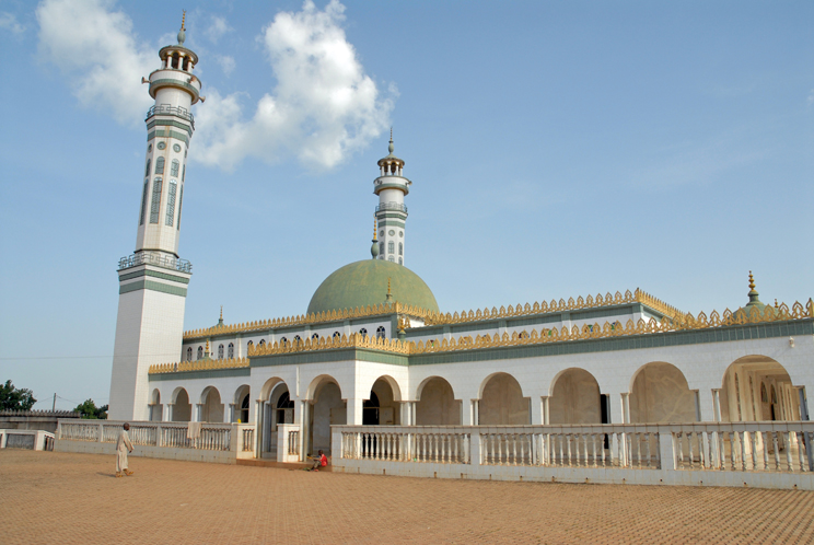 Mosquée de Ngaoundéré